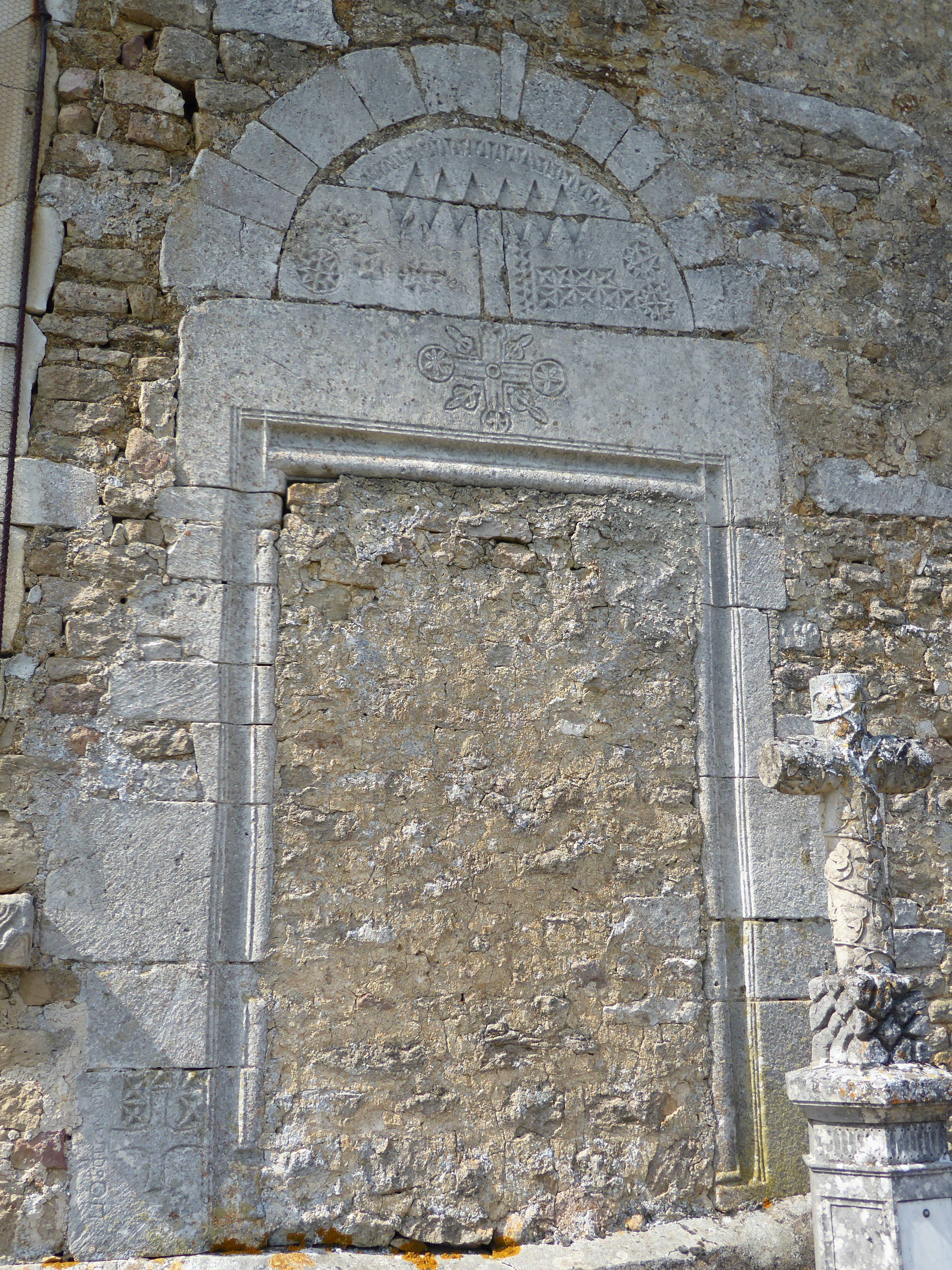 Portail latéral de l'église Saint-Vincent d'Aouze (face sud) dans le département des Vosges. Vestige de l'ancienne église romane datant du onzième siècle, avant les remaniements des quatorze et quinzième siècles dans le style gothique, il comporte un tympan décoré. Il est désormais muré. Inscrit sur la liste des monuments historiques le 3 mars 1926. .